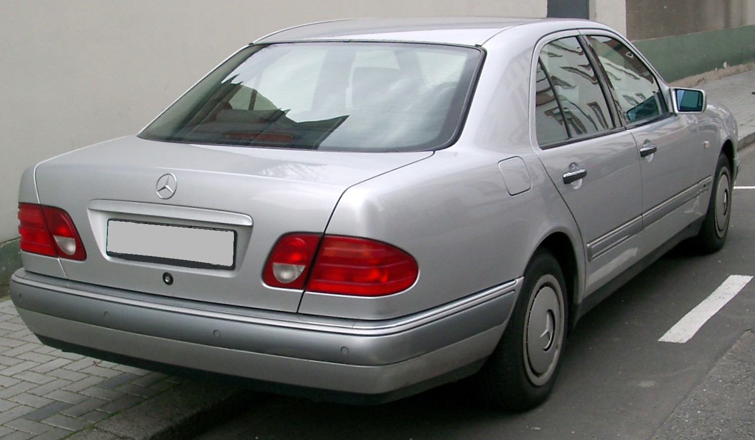 Mercedes-Benz W210 (E-Klasse)